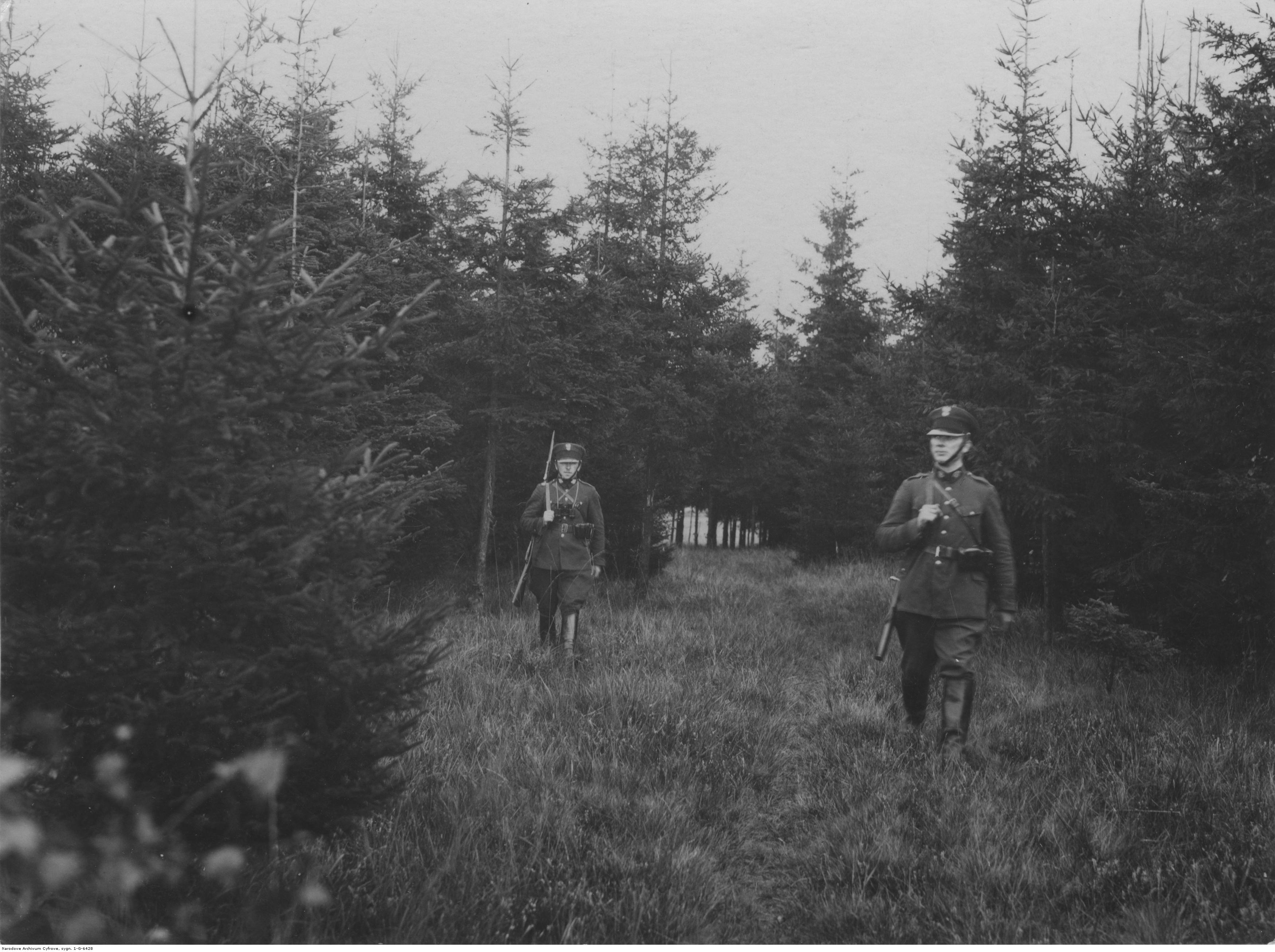 Komisariat Straży Granicznej Tarnowskie Góry - patrol w terenie. Koncern Ilustrowany Kurier Codzienny - Archiwum Ilustracji. Sygnatura: 1-G-6428